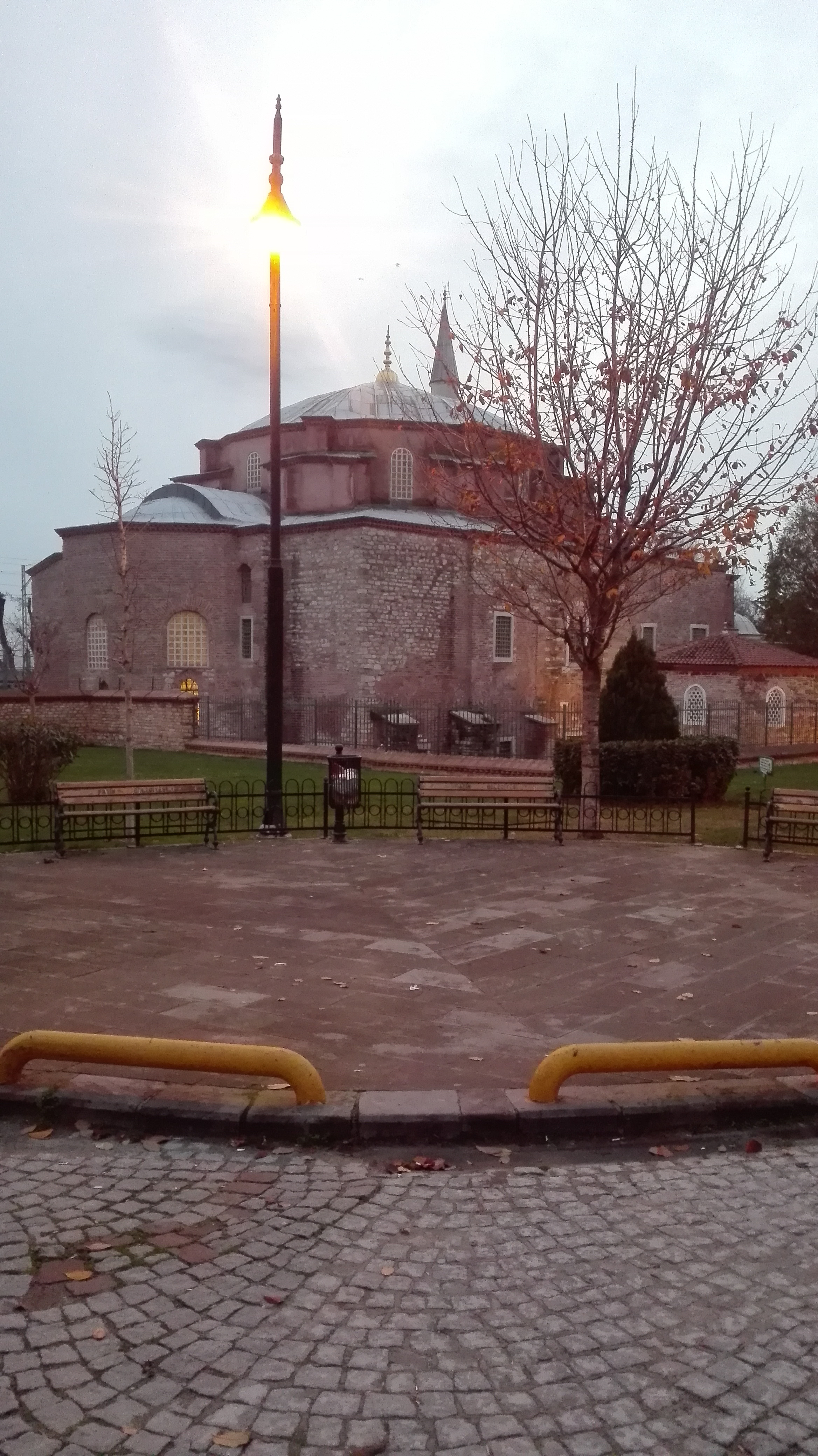 ایا صوفیہ صغری